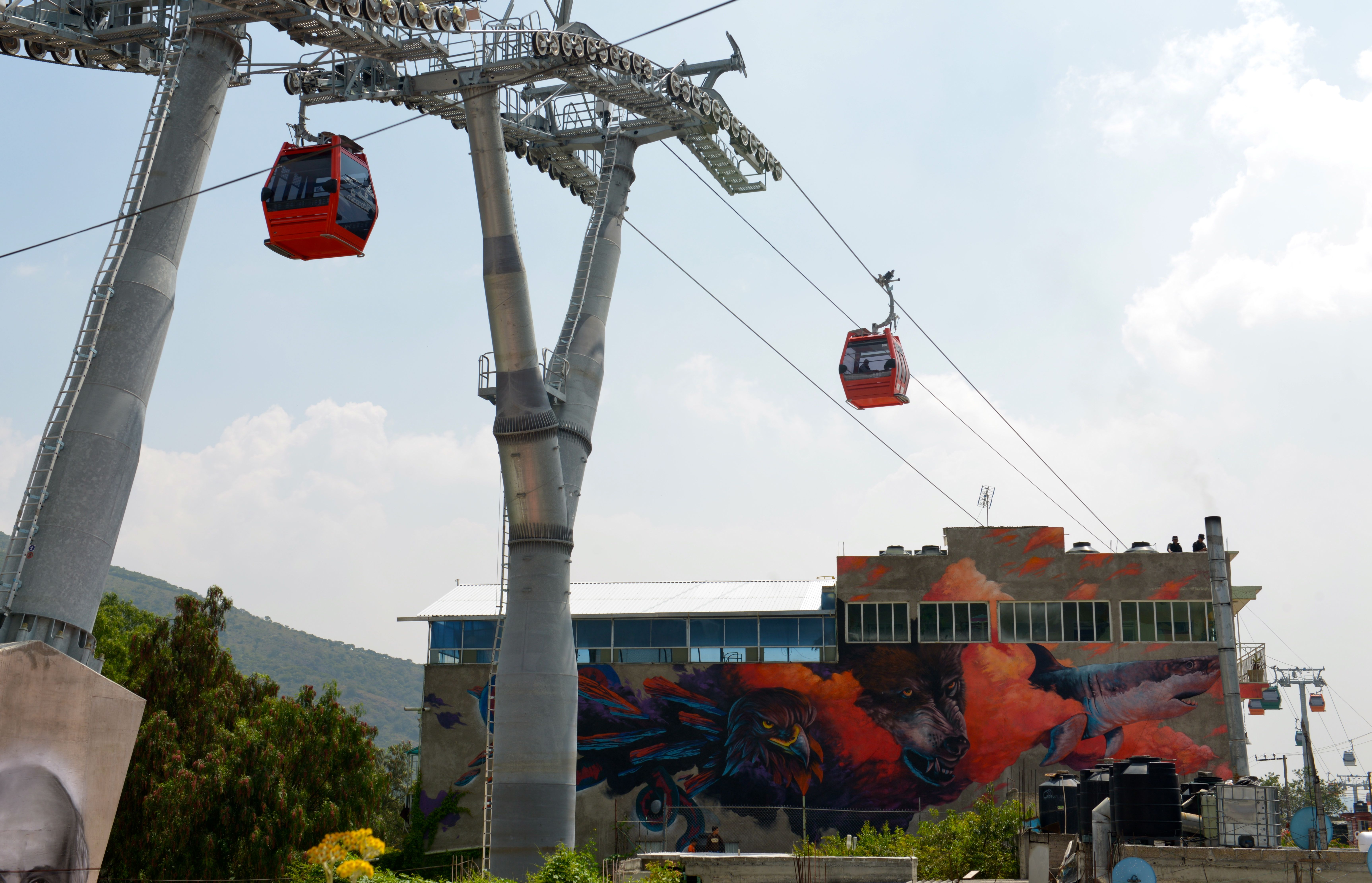 Mexicable de Ecatepec, Estado de México, en su inauguración.